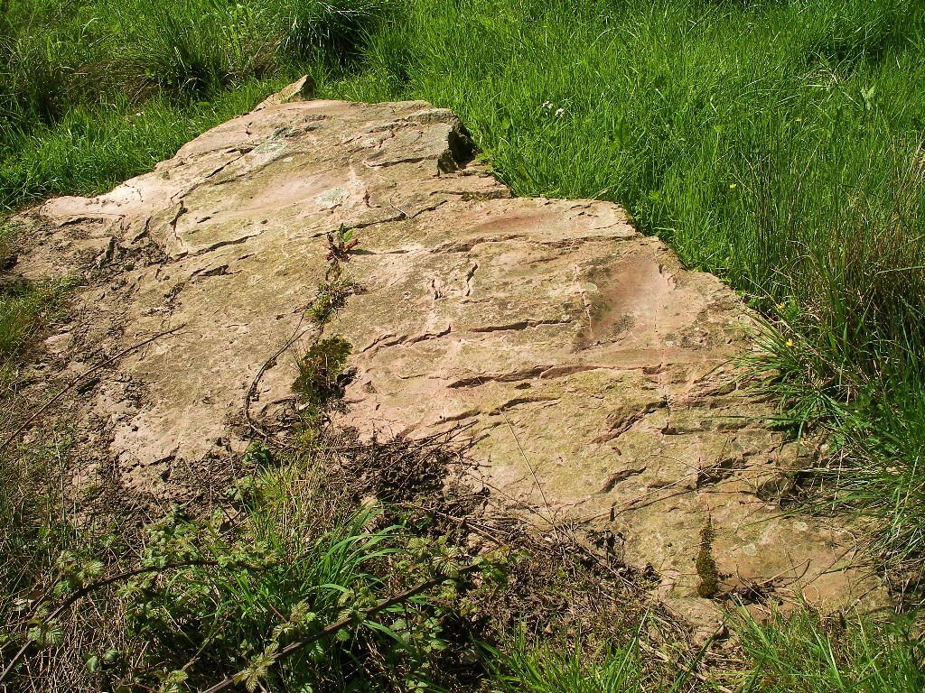 Polissoir néolithique sur la rive gauche du Laizon inscrit MH à Bons-Tassilly (Calvados)